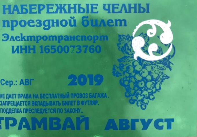 Проездной билет на трамвай август 2019 г.(Набережные Челны)